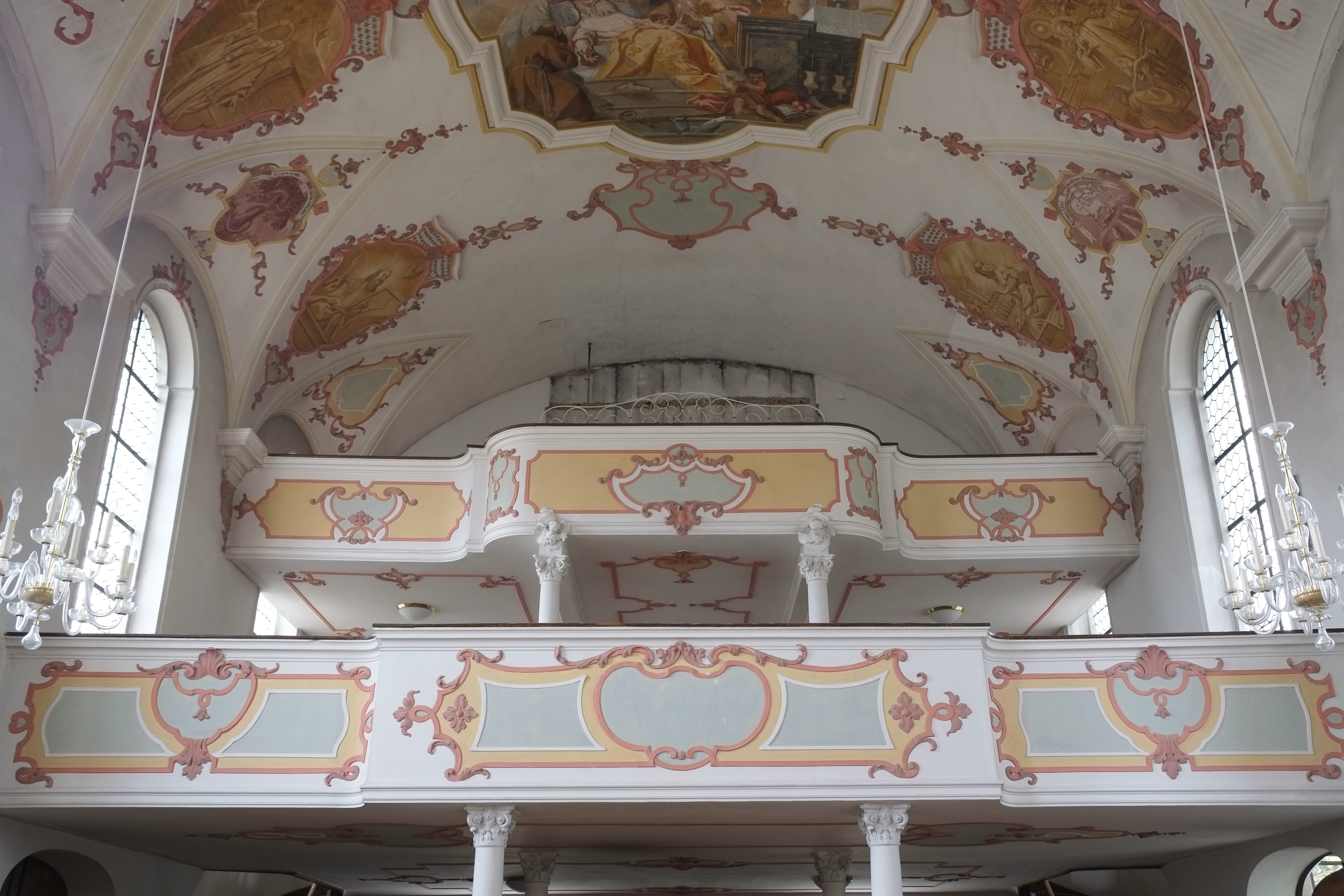 Katholische Pfarrkirche St. Nikolaus in Stadtbergen im Landkreis Augsburg (Bayern, Deutschland)